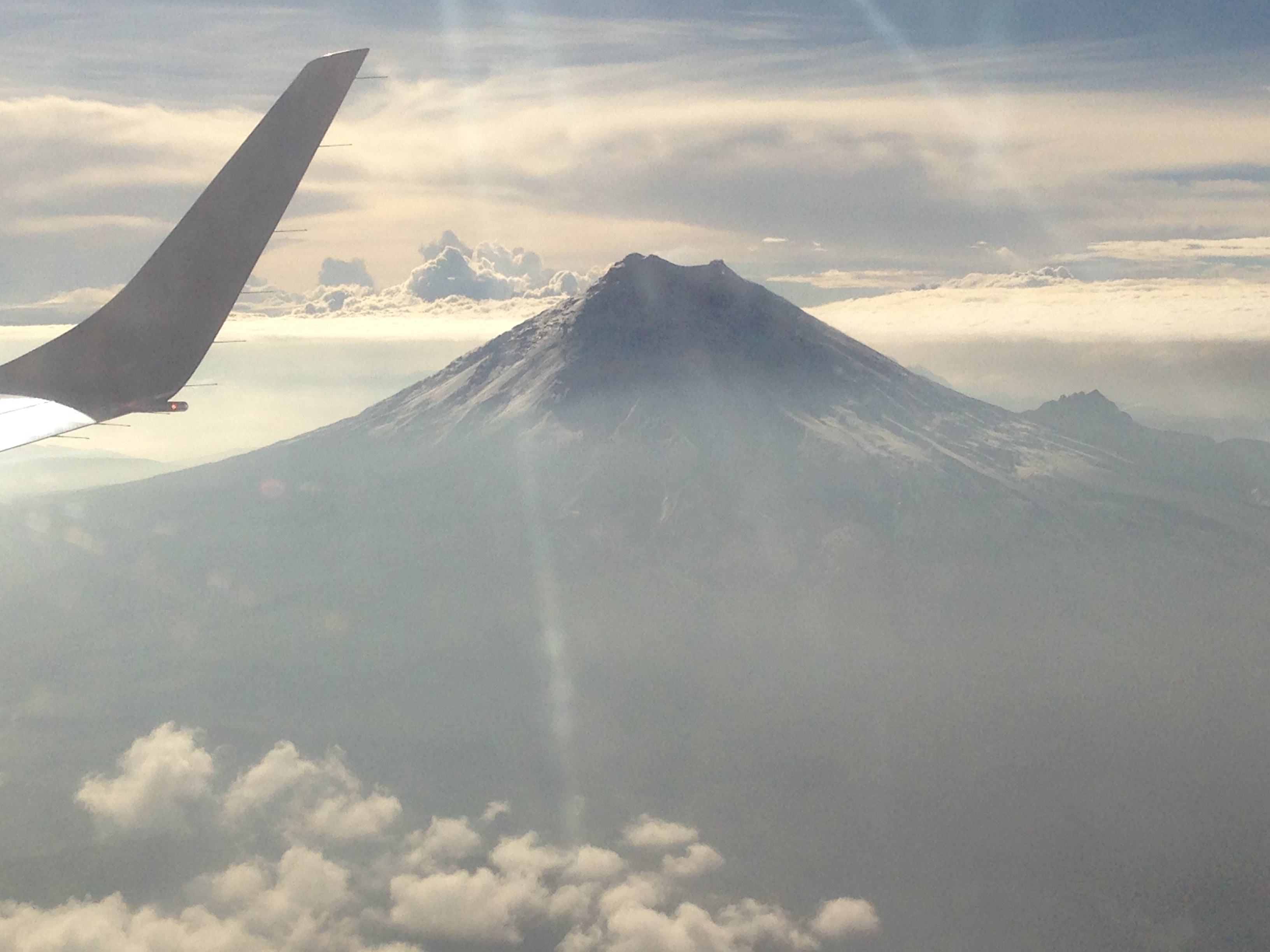 Cotopaxi desde avión